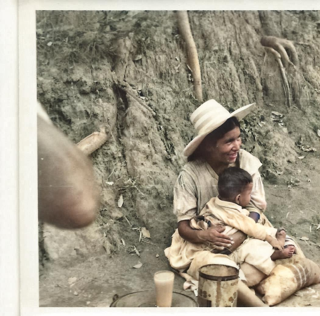 Yacuiba, abril año de 1965, una pobre señora con su hijo en brazos, vendiendo refrescos cerca de la quebrada que marcaba la frontera entre Bolivia y Argentina. Antes de la construcción del Puente Internacional que actualmente une Salvador Mazza (Argentina) con Yacuiba (Bolivia); se debía cruzar a pie la quebrada de Pocitos para pasar de un lado a otro de la frontera. Fotografía de Marcel Loosbergh (EE.UU.), coloreada con colourisesg